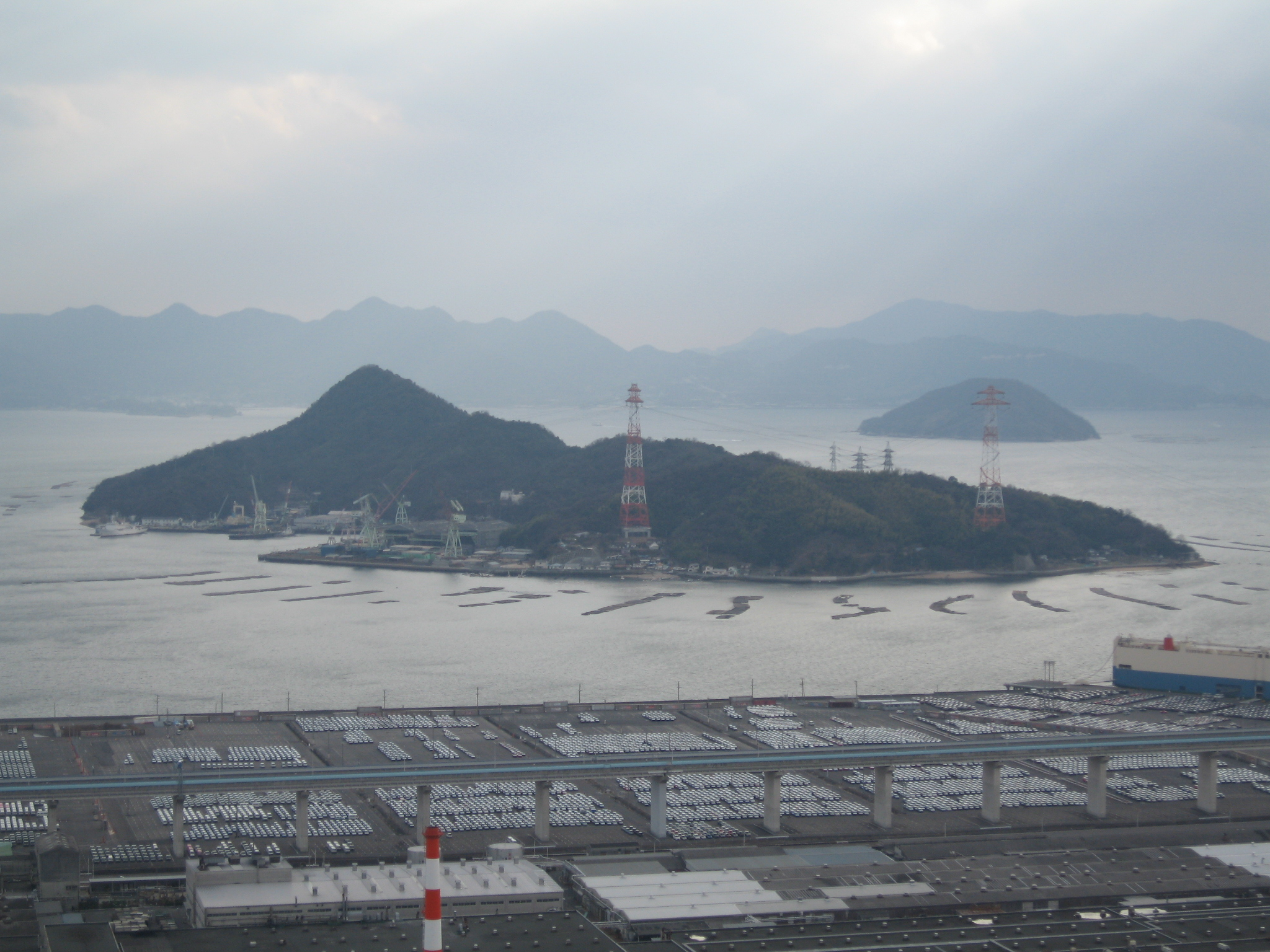 Kanama-jima Island, Hiroshima, Japan